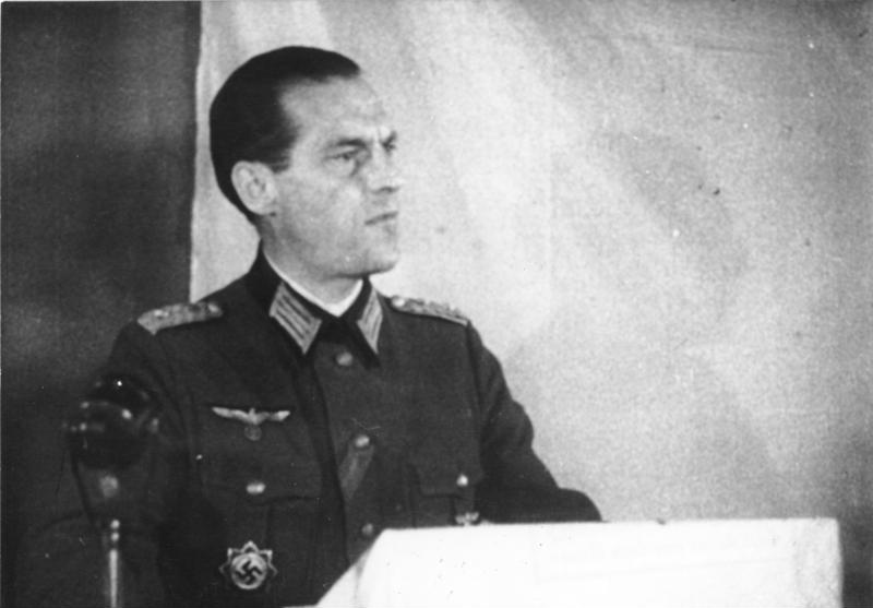 Hans-Günter van Hooven Zentralbild/Repro 16.8.1962 Gründung des antifaschistischen "Bundes deutscher Offiziere" Oberst van Hooven, ehemaliger Armeenachrichtenführer der 6. Armee (Stalingrad) ruft auf der Gründungsversammlung des antifaschistischen "Bundes deutscher Offiziere" am 11./12. September 1943 seine Kameraden zur Rettung des Vaterlandes durch Sturz des Hitler-Regimes und zur sofortigen Beendigung des Krieges auf. H.G. van Hooven war Vizepräsident des "Bundes Deutscher Offiziere", und Mitglied des Nationalkomitees "Freies Deutschland". Abgebildete Personen: Hooven, Hans-Günter van: Oberst, Heer, Vizepräsident Nationalkomitee Freies Deutschland, Deutschland